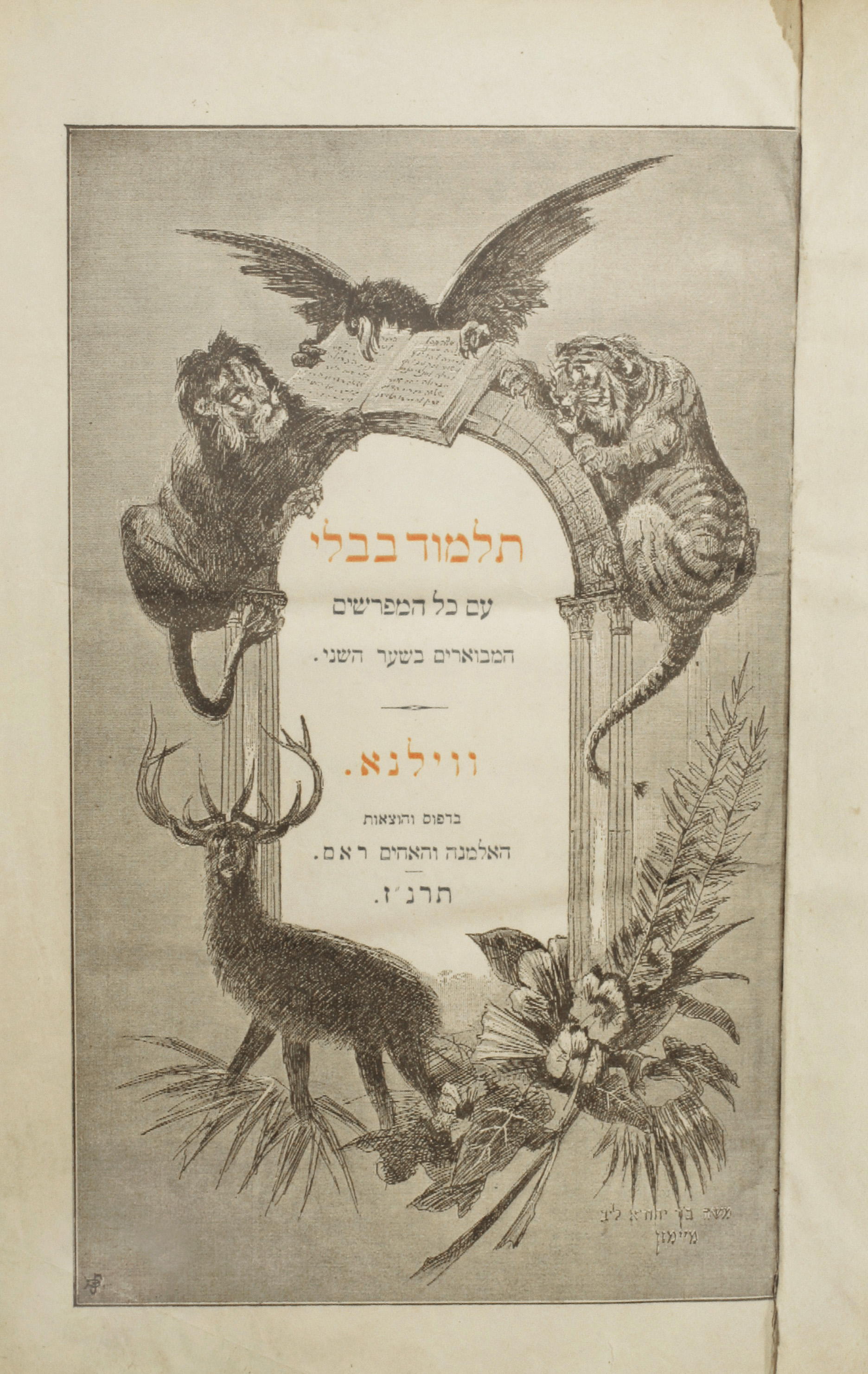 Гравюра-иллюстрация к Виленскому ШАСу, выполненая гравёром Авнером Грилихом. Из библиотеки Шнеерсона, г. Москва.